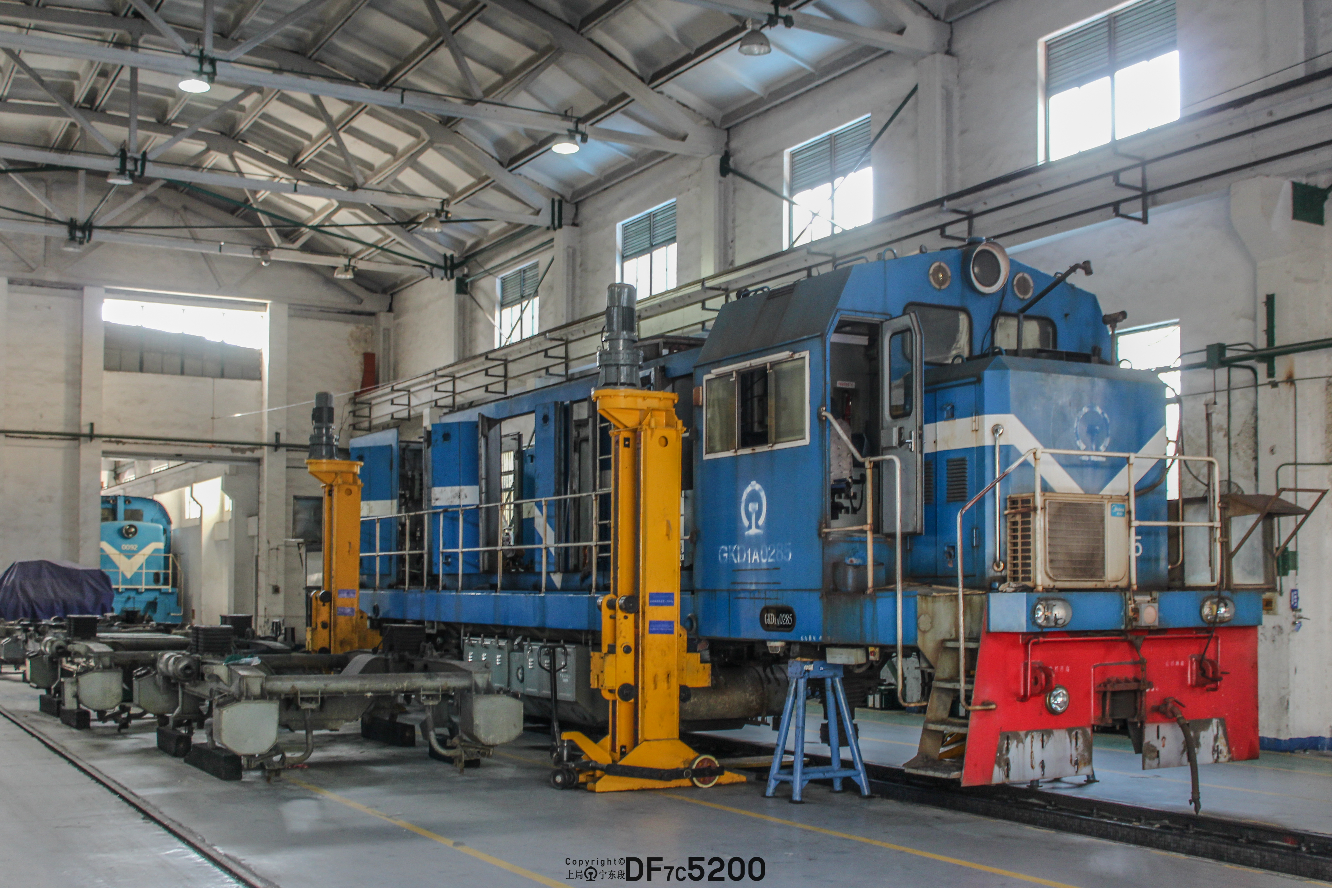 中文（中国大陆）: 上海梅山钢铁购买的GKD1A型内燃机车